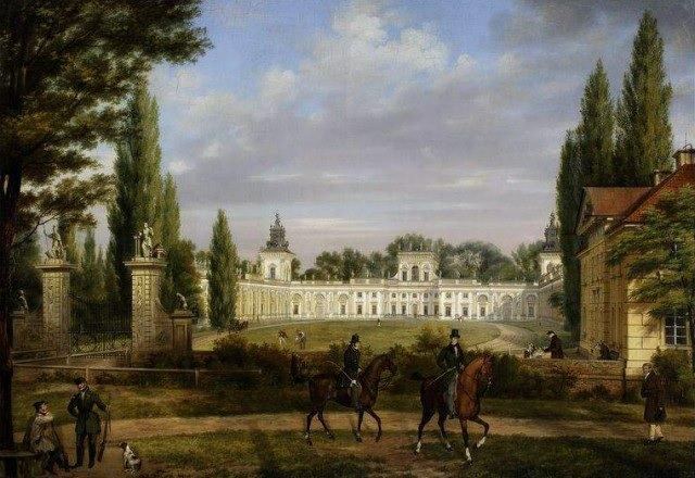 Widok Wilanowa od strony wjazdu